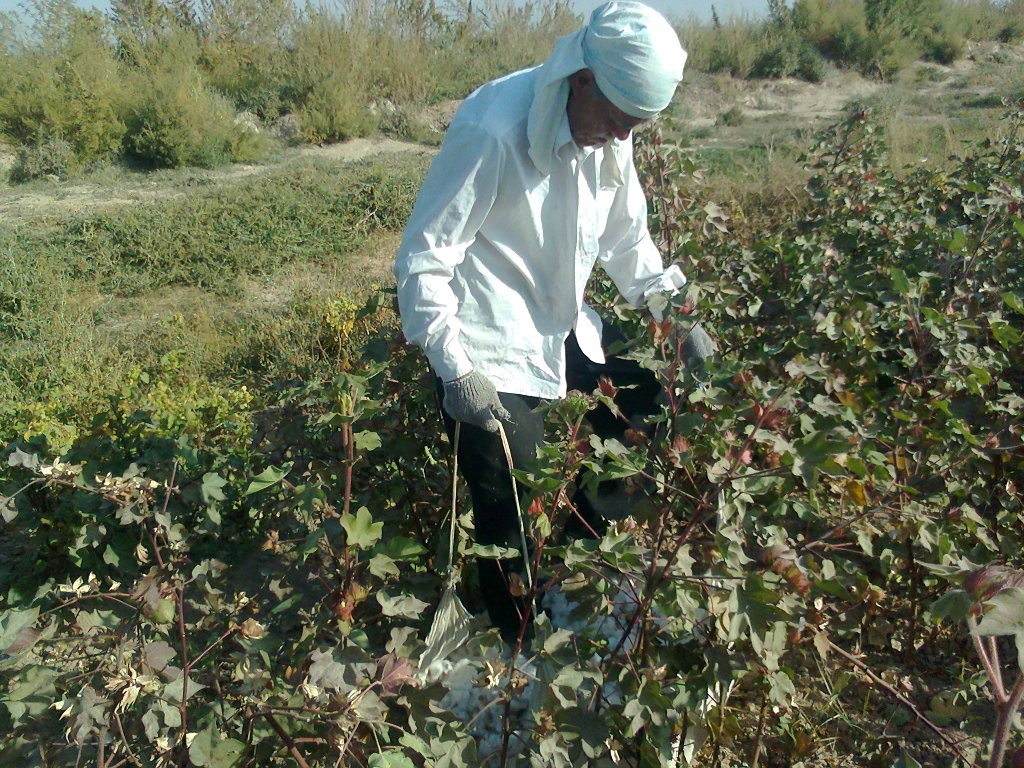 Техника прессования собранного хлопка сырца в хлопковых полях Узбекистана